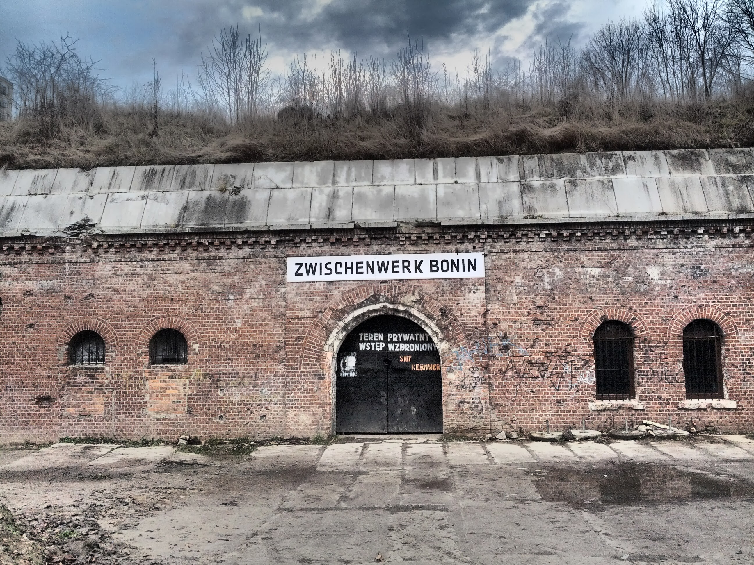 Fort Va, Poznań, Polska